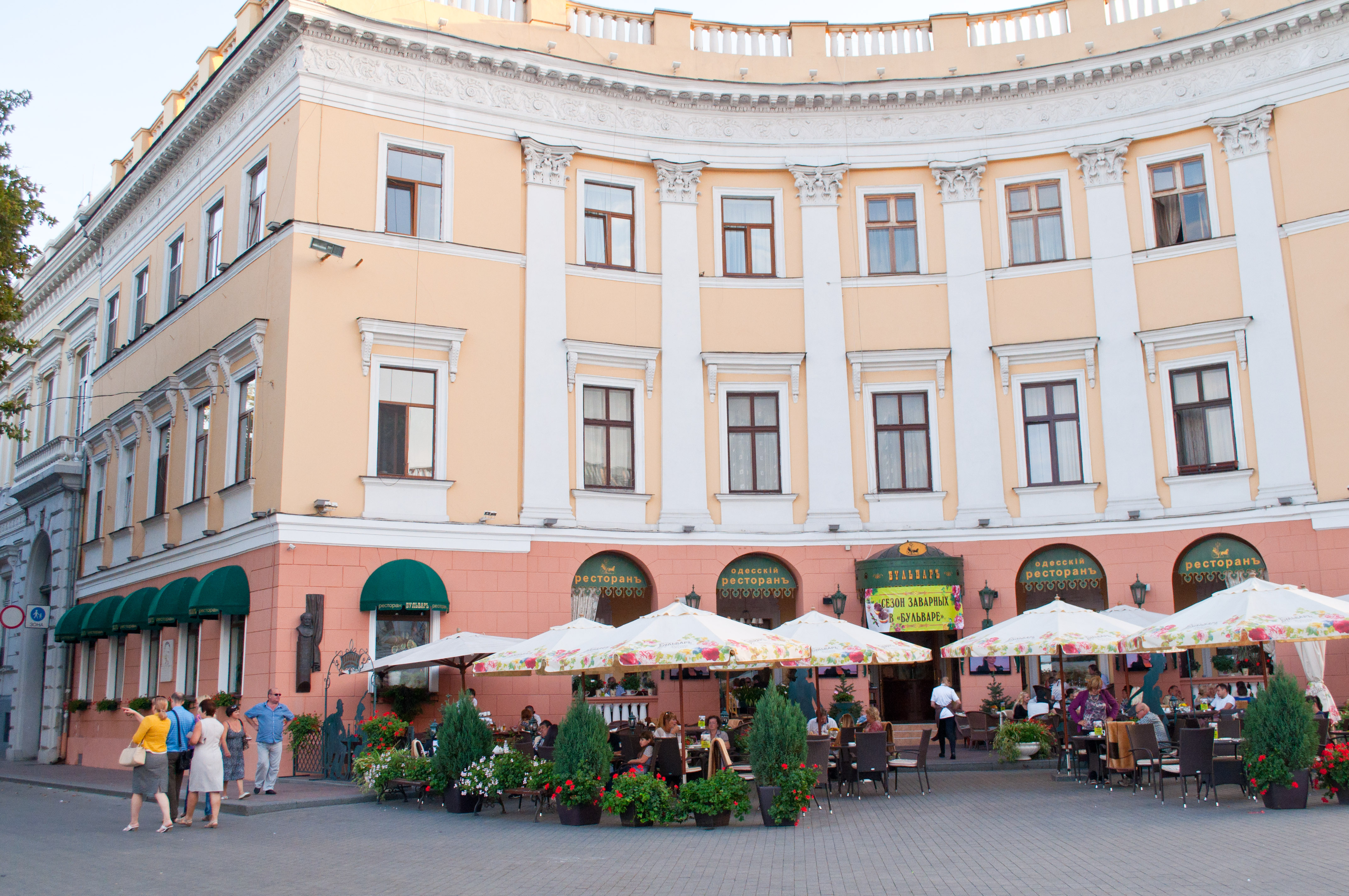 Будинок Завадовського (готель «Петербурзький») Будинок колишнього готелю в якому жили: у 1831–1836 рр. - Брюллов К.П. - художник; - у 1843 р. - Молчанов П.С. - актор; - у 1846 р. - Бєлінський В. Г. - літератор; - у 1847 р. Ференц Ліст - угорський комп